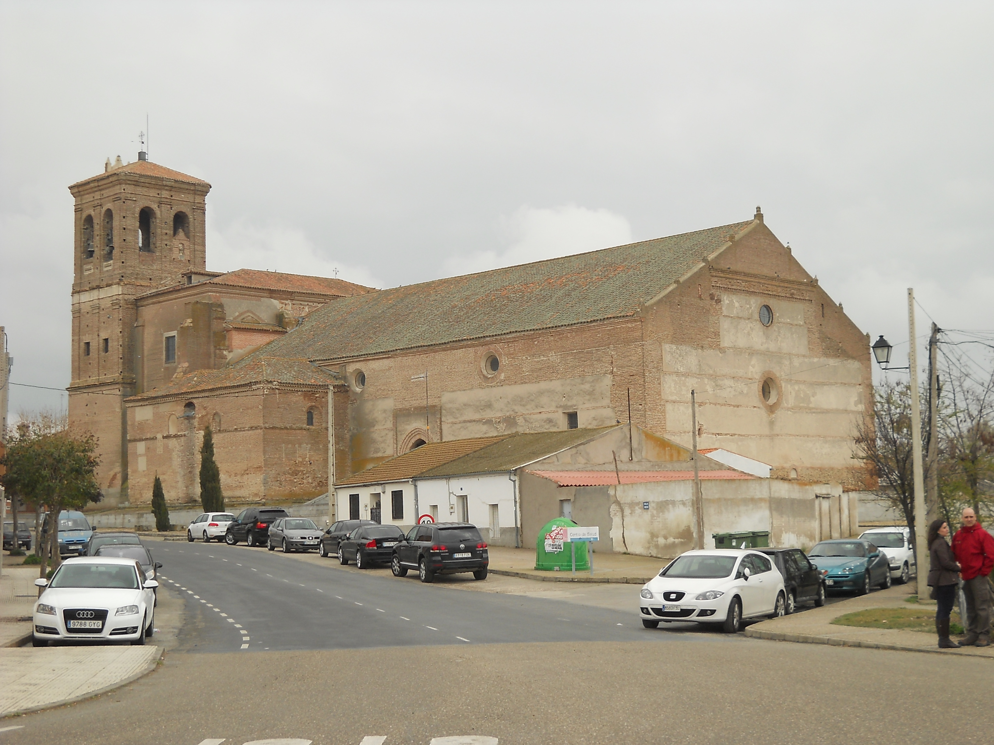 Iglesia de san Cipriano, Fontiveros, Ávila, España